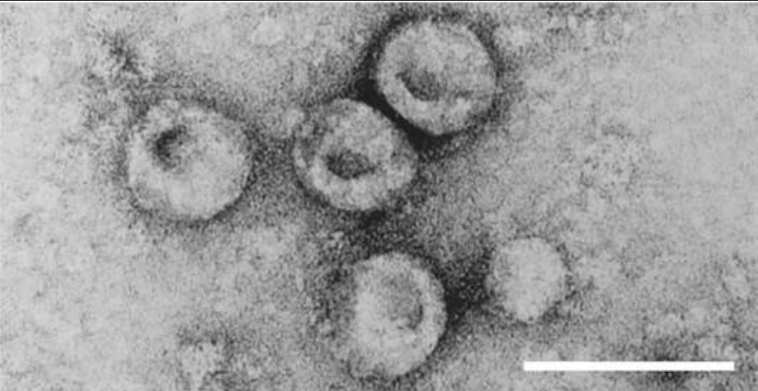 पेस्टिवाइरस रोग